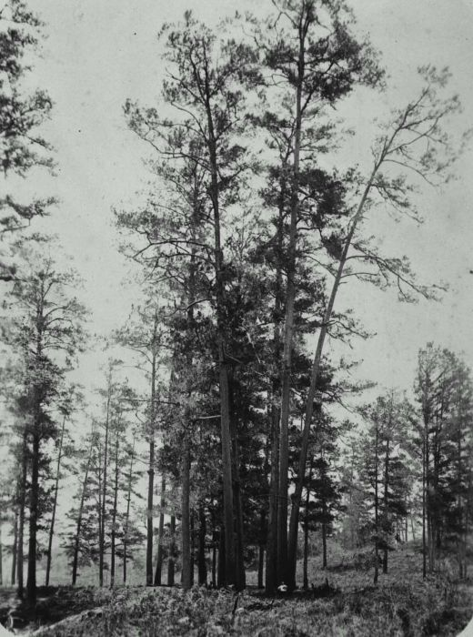 Foto. Een Pinus dennenboom van circa 75 meter hoog, Gajolanden